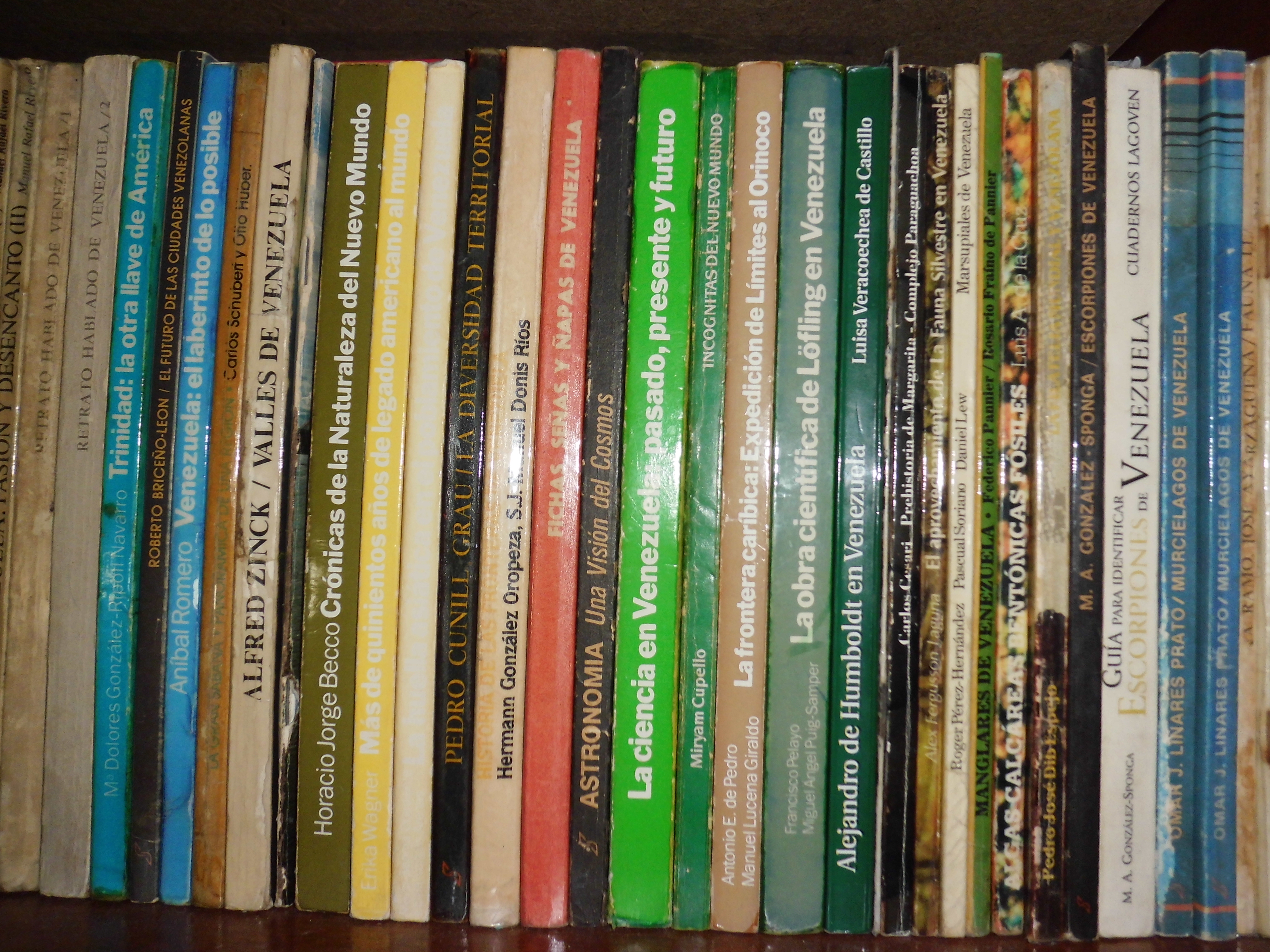 Libros de colección personal de user Veronidae.